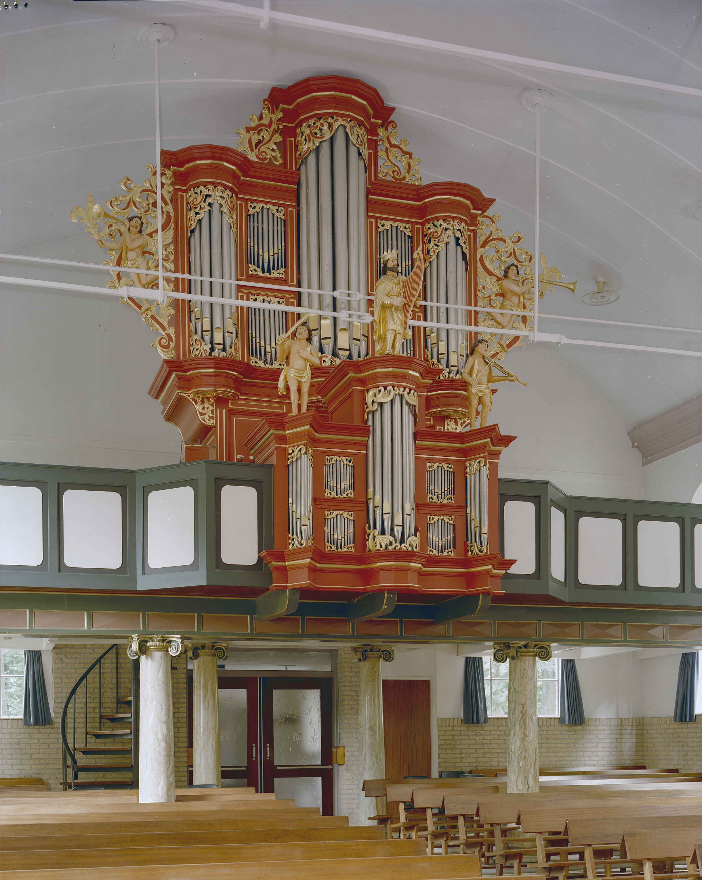 Gereformeerde kerk: Interieur, aanzicht orgel, orgelnummer 163 (opmerking: Gefotografeerd voor Het Historische Orgel in Nederland 1726-1796, bladzijder 159)